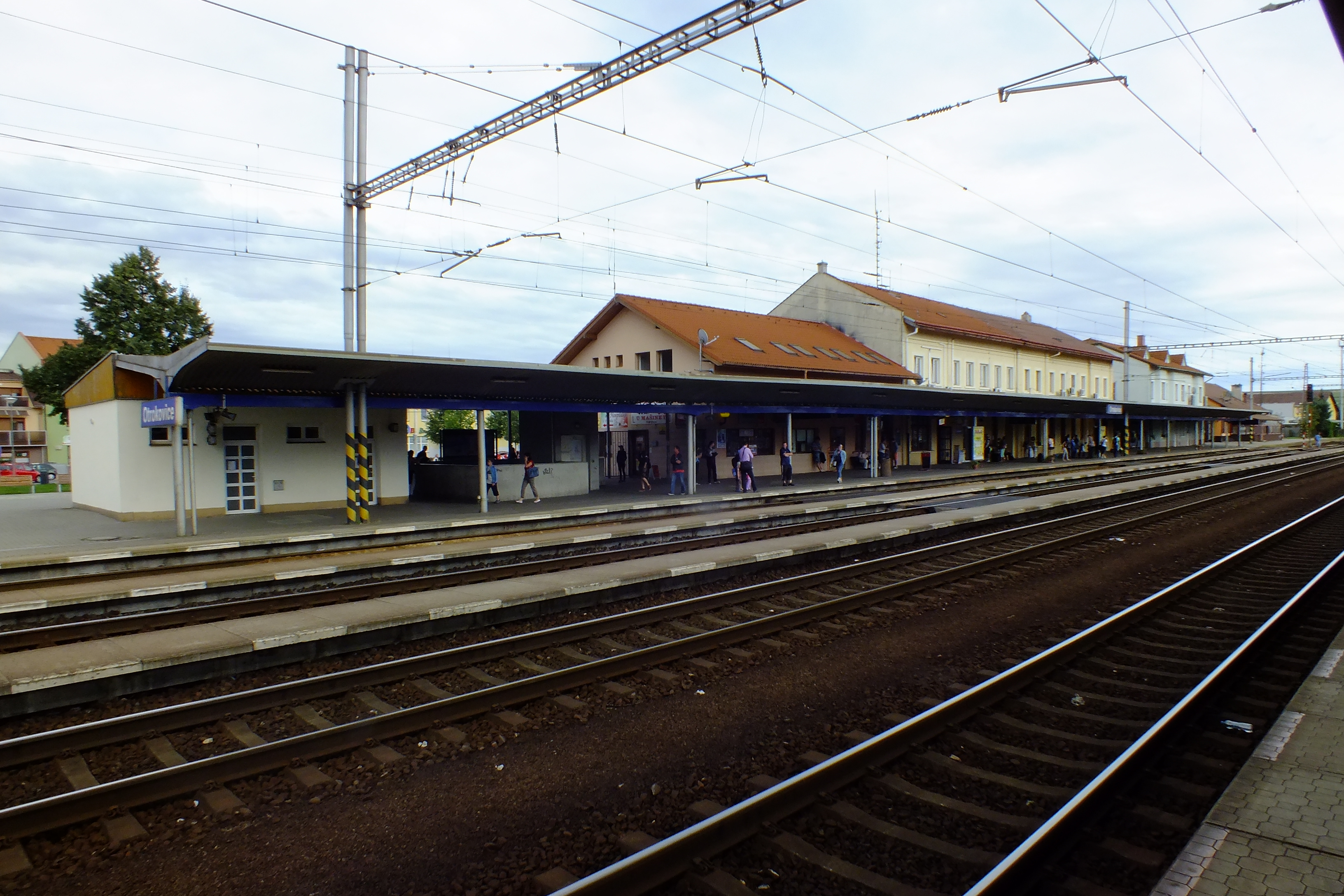 Staniční budova